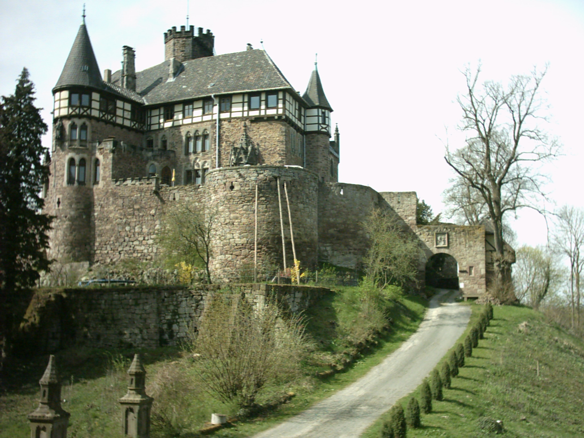 Schloss Berlepsch bei Witzenhausen (Hessen)